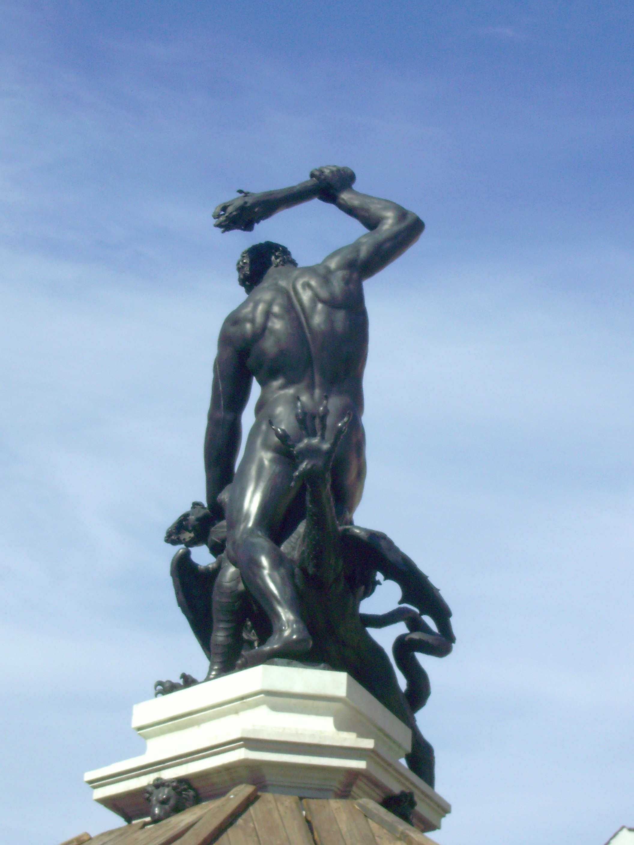 Herkulesbrunnen, Augsburg, Rückseite, Blick etwa von Süden